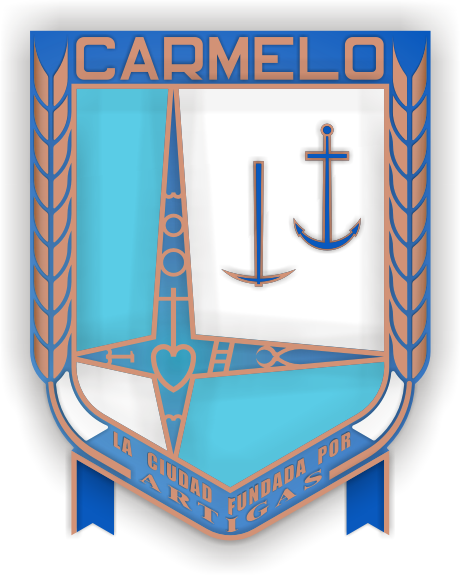 Medidas originales según archivos de la biblioteca municipal de Carmelo